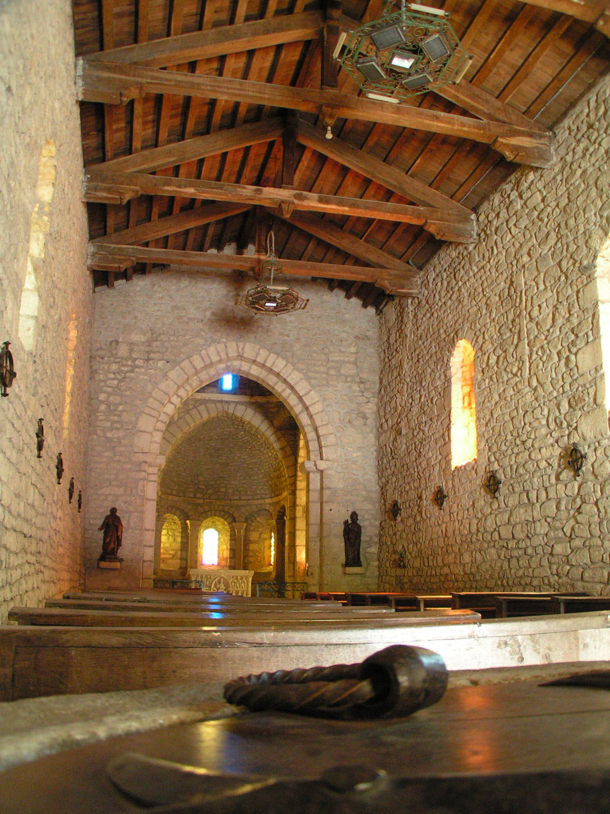 Eglise de Notre-Dame-d’Avenas (architecture romane XIIe)